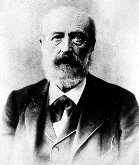 Georg Friedrich Wilhelm Victor Hüter (1832–1897), 1858–1897 Privatdozent und Arzt für Geburtshilfe in Marburg.